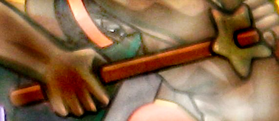 MAkana, un arma común en el ejército inca.